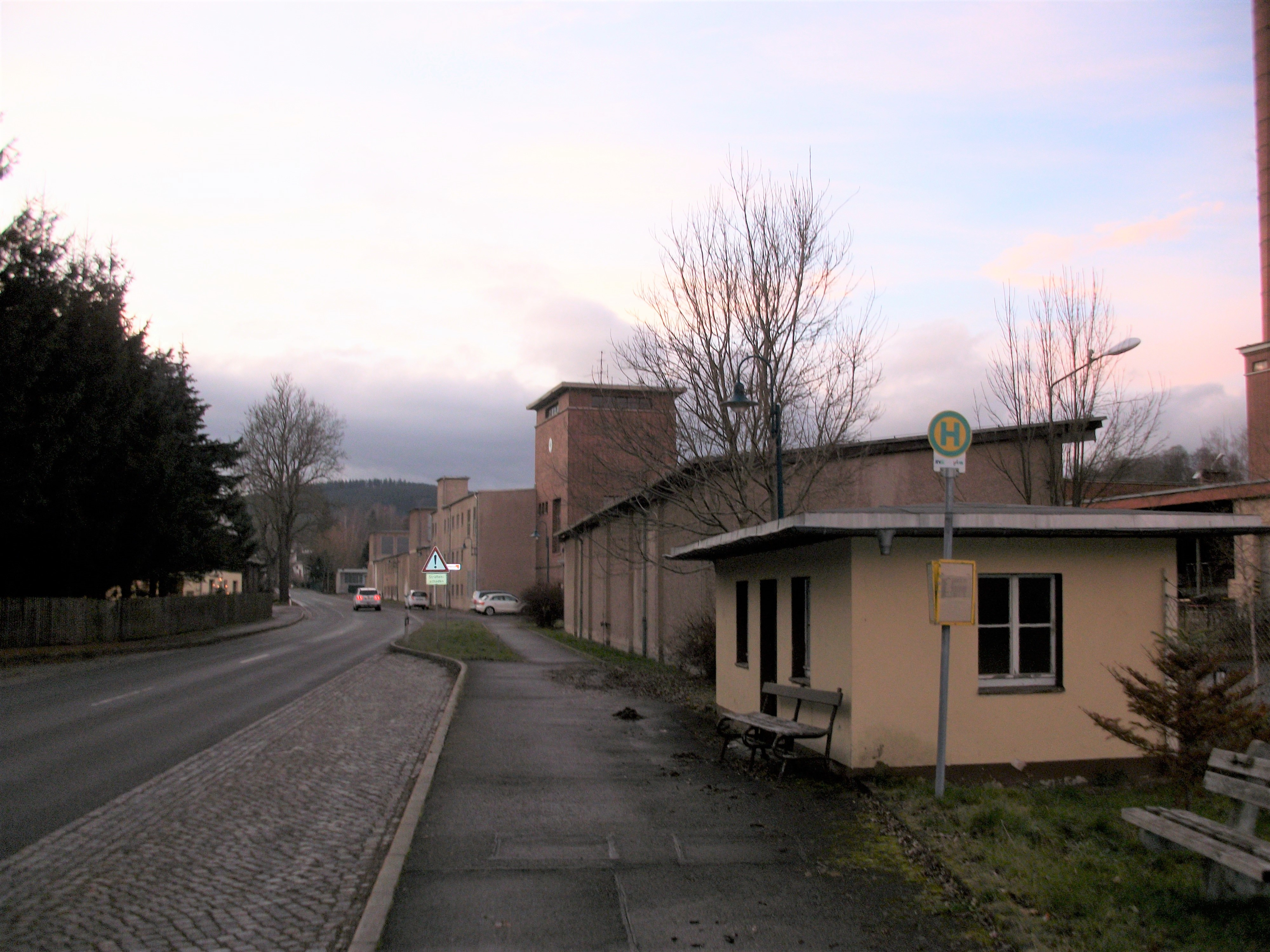 Bahnhof Tannenberg Ost, Blick Richtung Thum16)